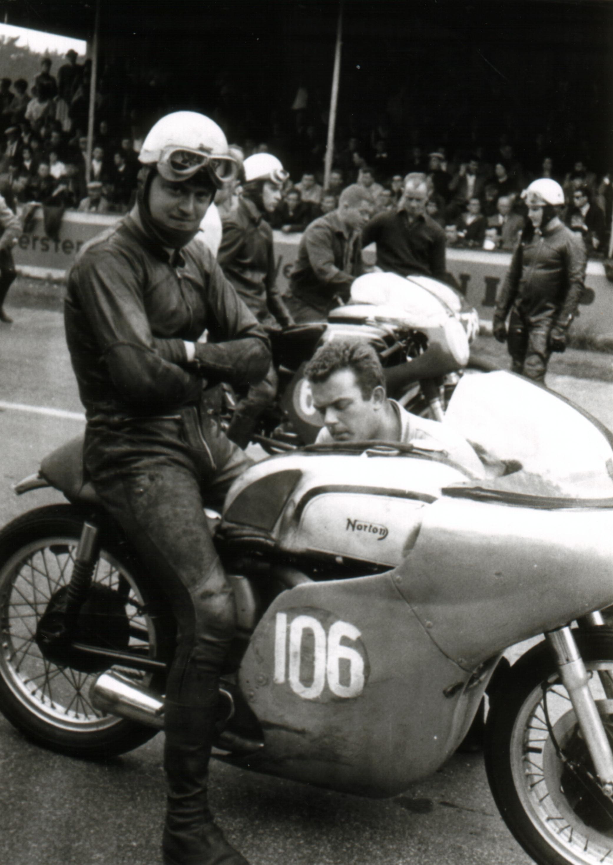 Andreas Klaus, WM-Lauf Hockenheimring, 1963